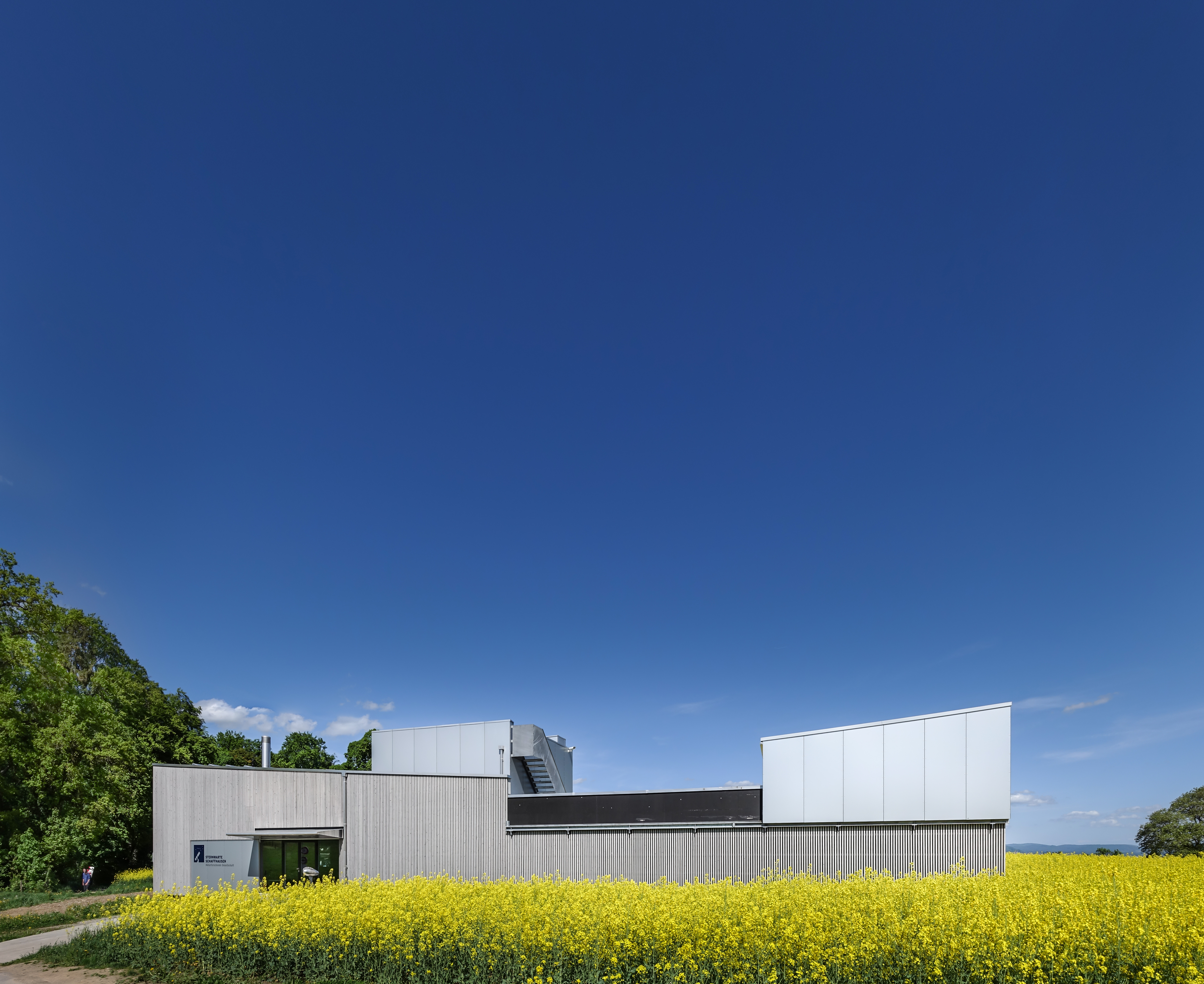 Die neue Sternwarte Schaffhausen ist seit 2012 in Betrieb. Rechts: Das Schiebedach der Beobachtungsplattform.